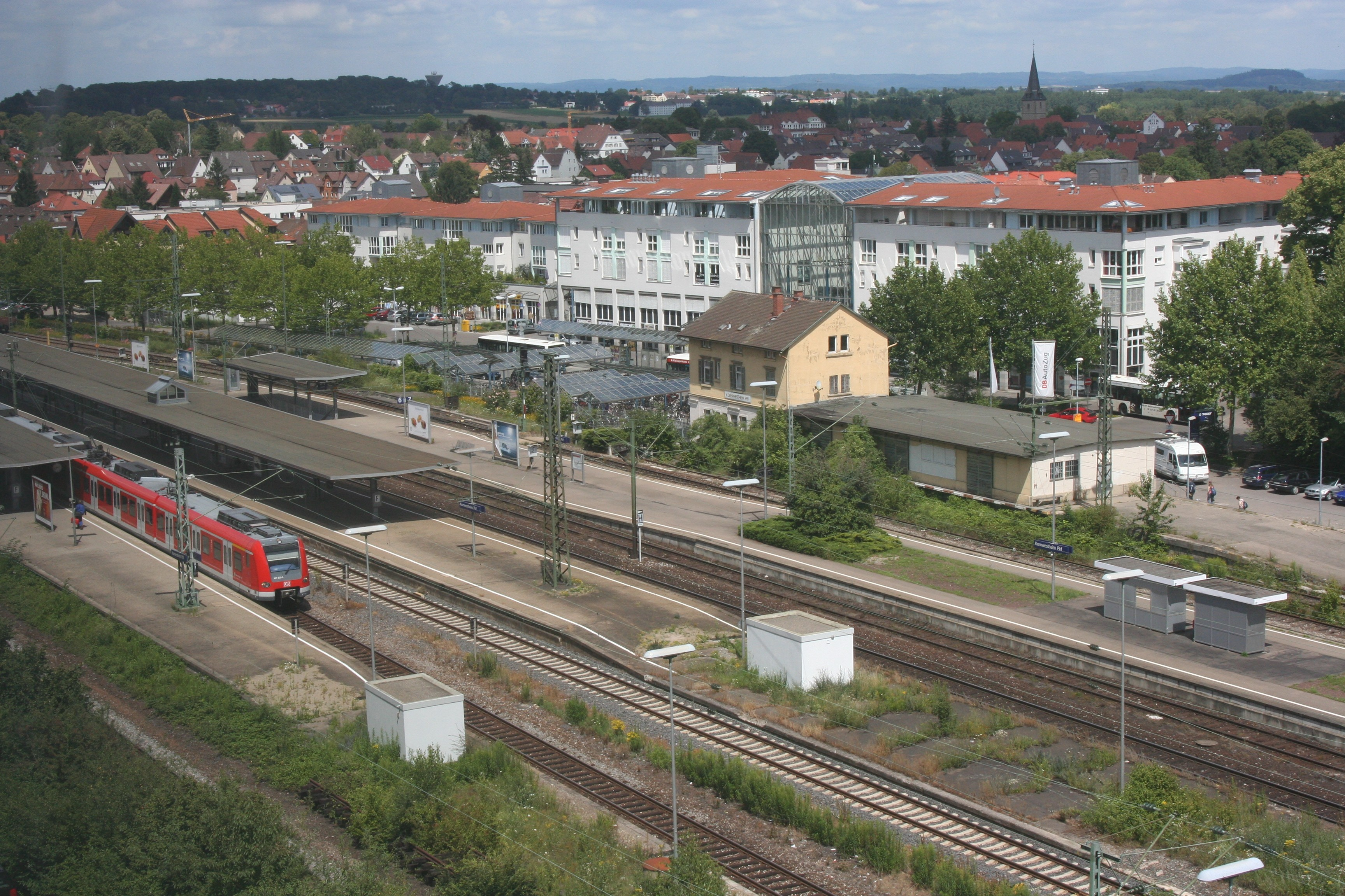 Der Kornwestheimer Personenbahnhof. (Fotografiert durch eine nicht völlig saubere Fensterscheibe.)